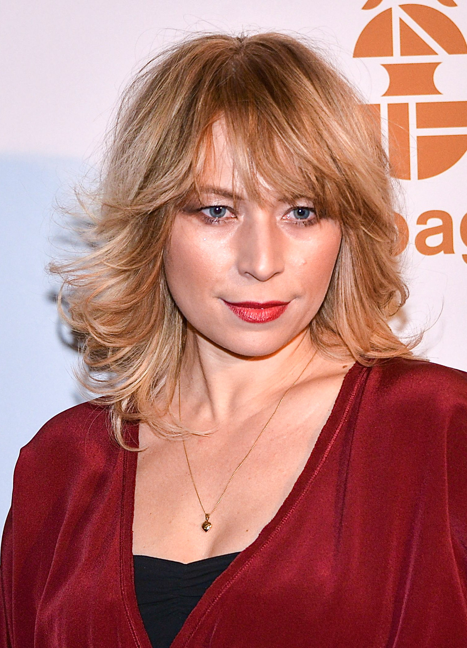 Frida Hallgren på på Guldbaggegalan 2013 den 21 januari 2013.